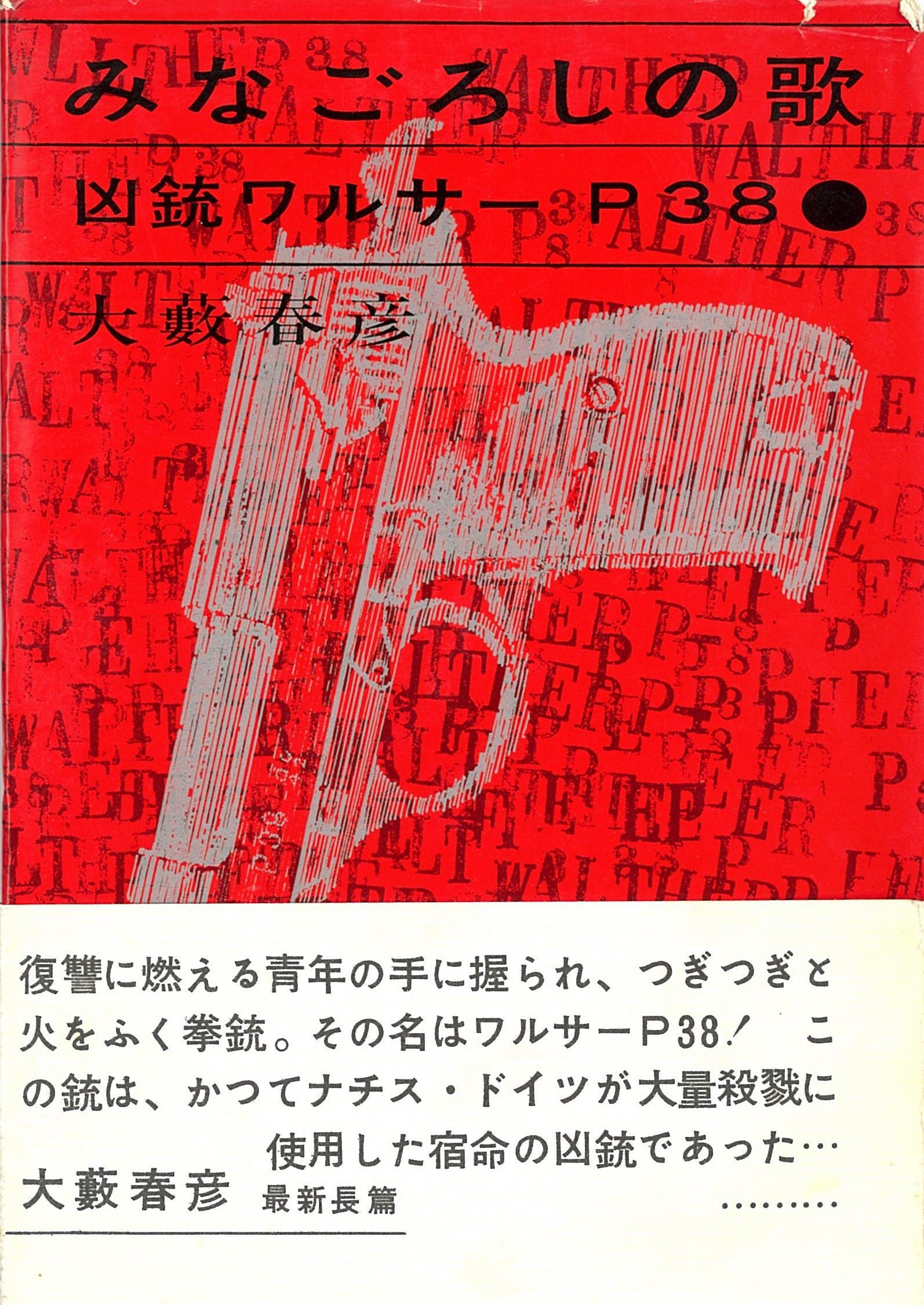 装幀：デザイン実験室「えこうむ」神内睦人